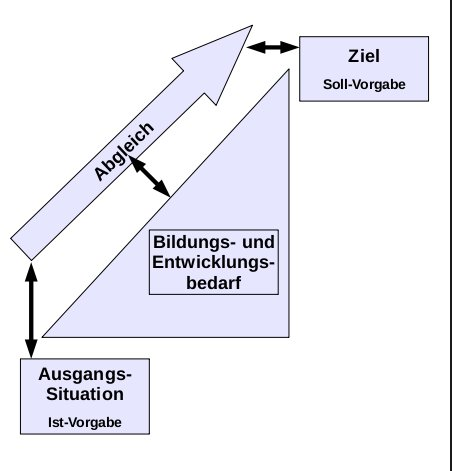 Beadarfscontrolling